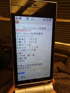 モバイルSuica特急券（新幹線改札内）